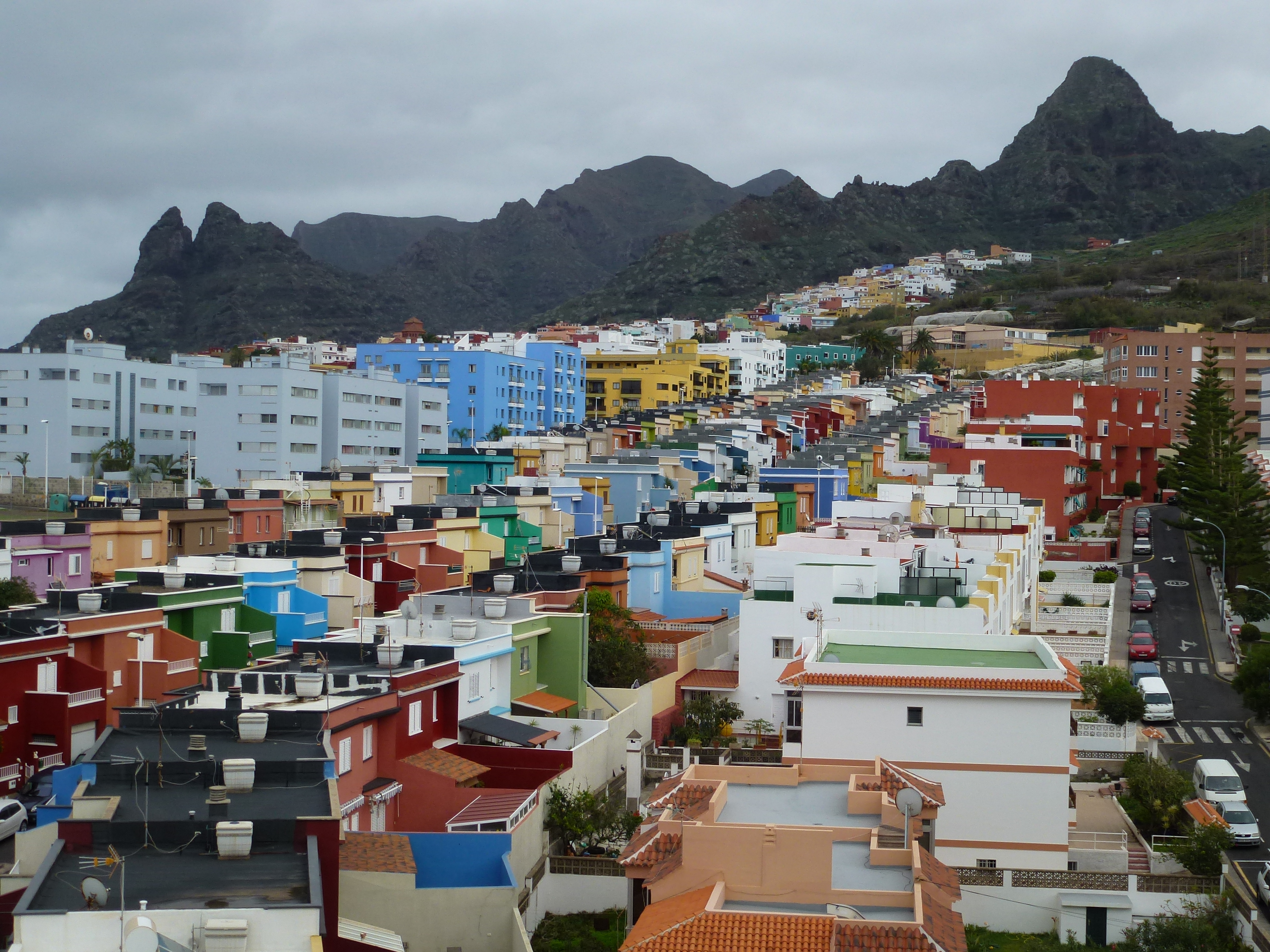 Blick vom Apartmenthochhaus Altagay über Punta del Hidalgo auf Teneriffa in östlicher Richtung.